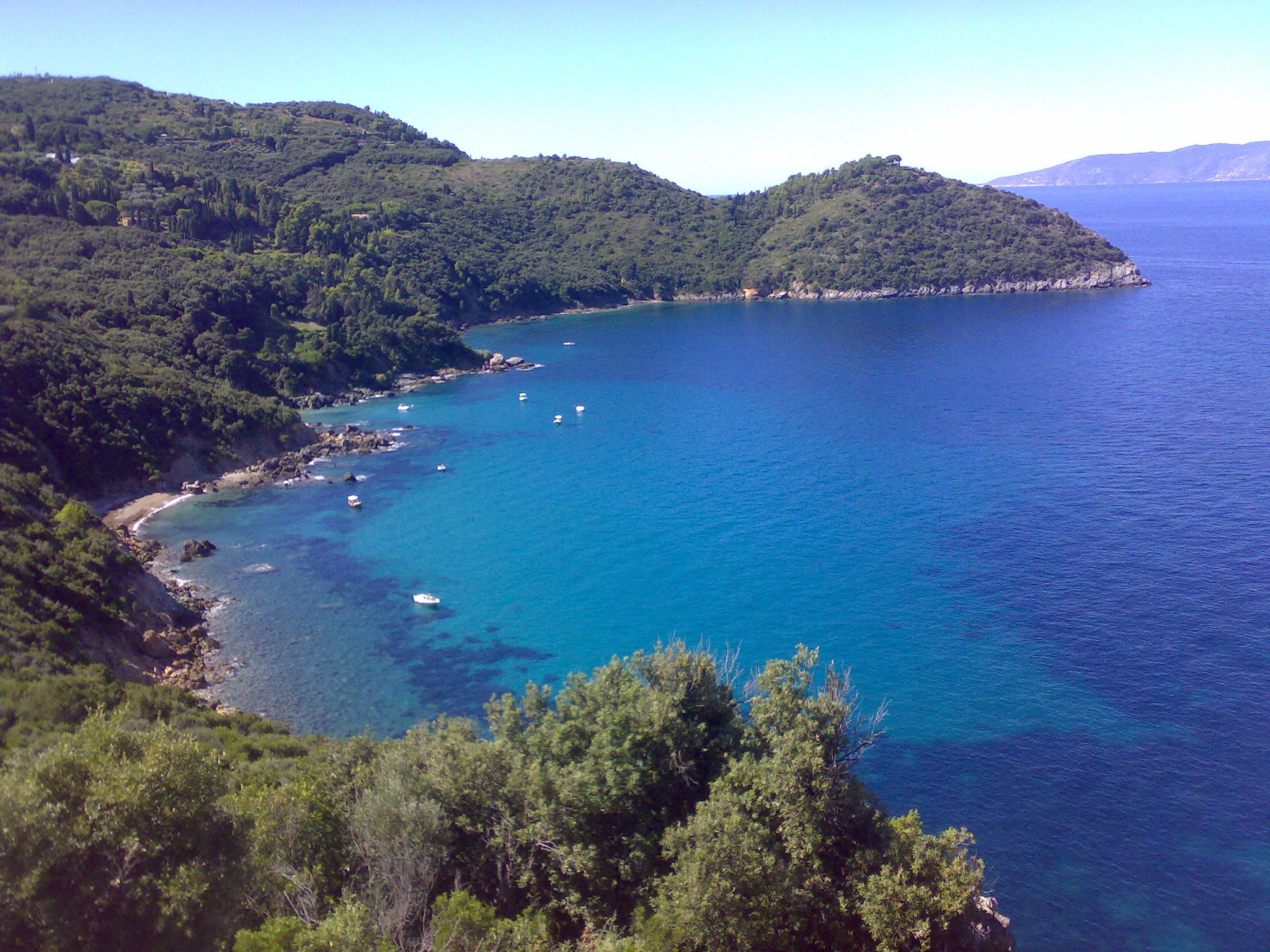 Panorama di Cala Grande dalla strada panoramica di Porto Santo Stefano. Sullo sfondo a destra l'Isola del Giglio.